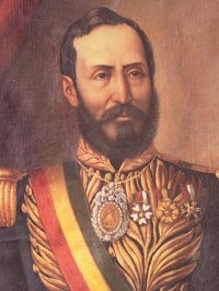 Manuel Isidoro Belzu (1808-1865), bolivianischer Präsident